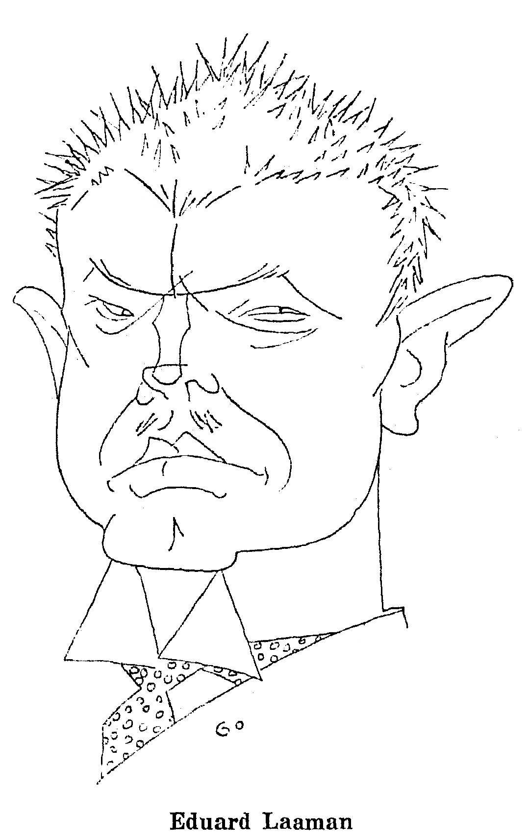 Gori šarž Eduard Laamann'ist